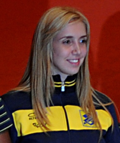 A jogadora de voleibol Thaísa na 3ª Conferência Nacional do Esporte.